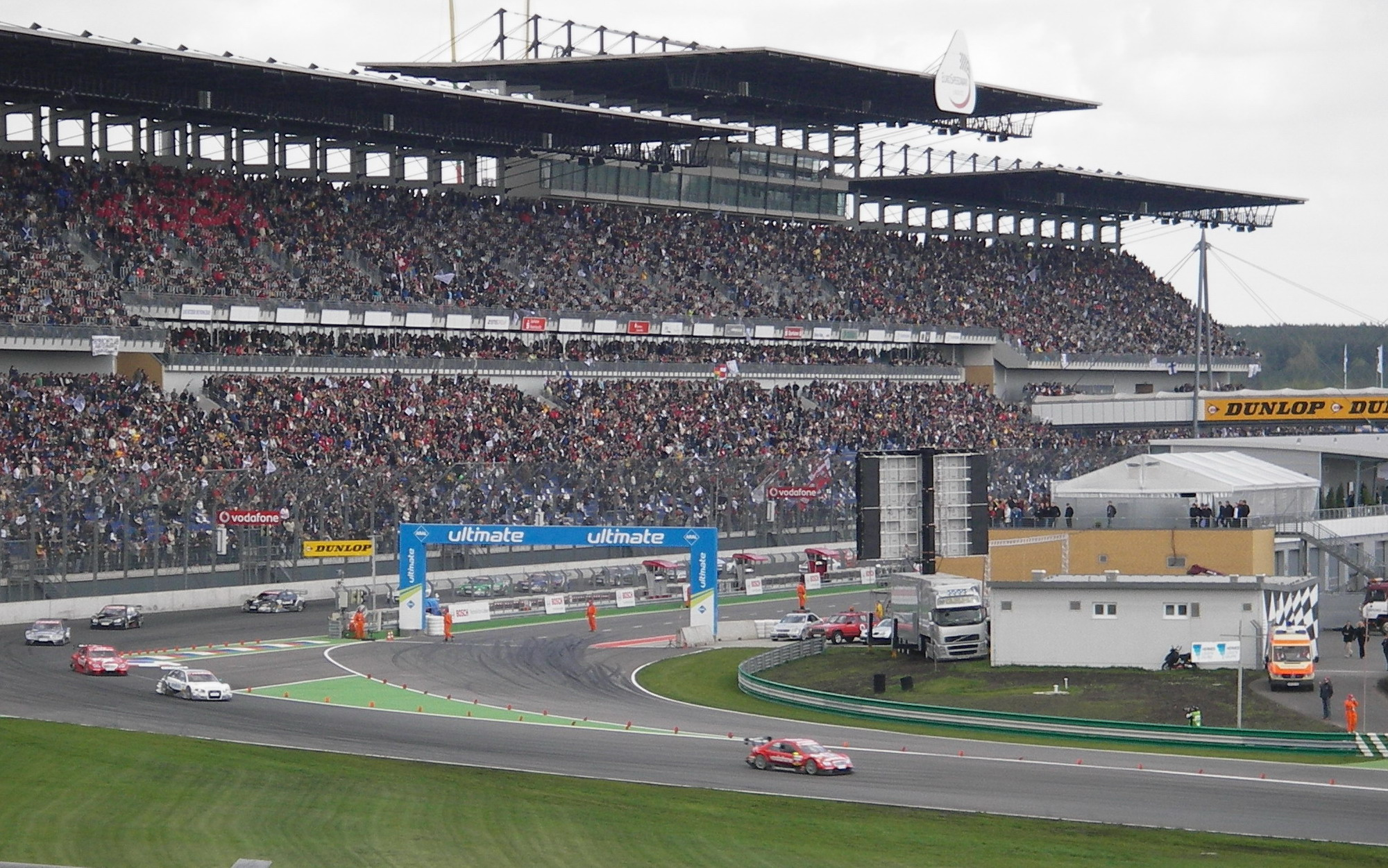 DTM am Eurospeedway